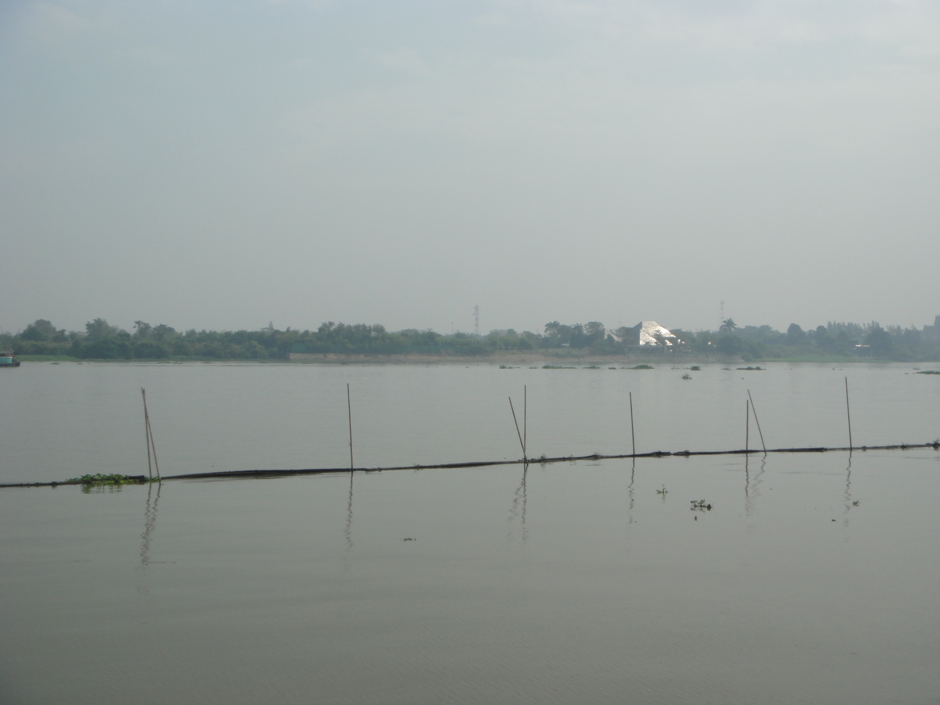 Chang Yai, Amphoe Bang Sai, Phra Nakhon Si Ayutthaya 13290, Thailand